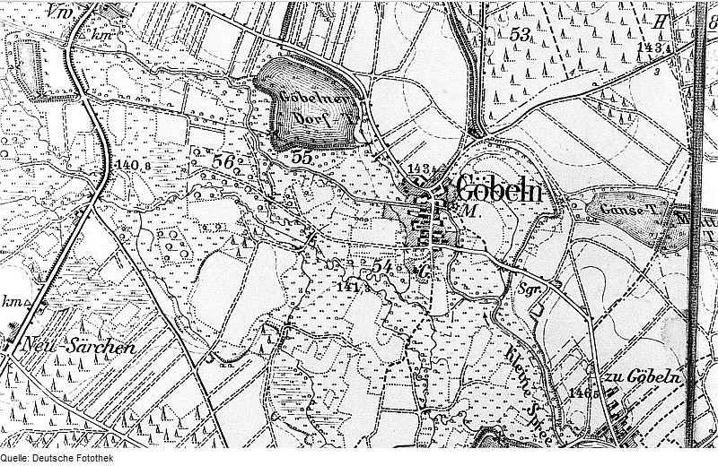 Original image description from the Deutsche Fotothek Großdubrau-Göbeln. Meßtischblatt, Sekt. Baruth-Weigersdorf